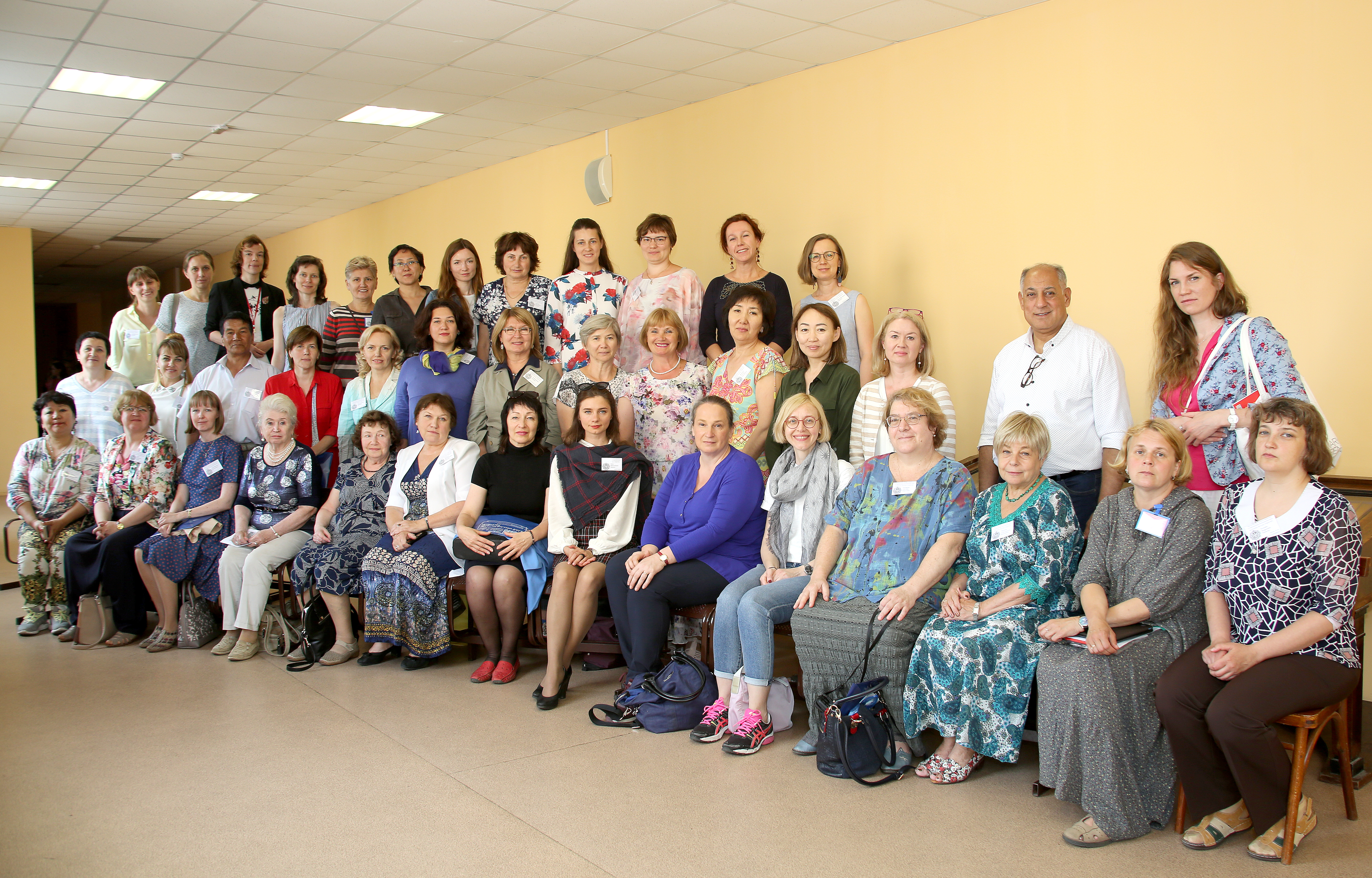 СОВРЕМЕННАЯ ОНТОЛИНГВИСТИКА: ПРОБЛЕМЫ, МЕТОДЫ, ПЕРСПЕКТИВЫ 2019